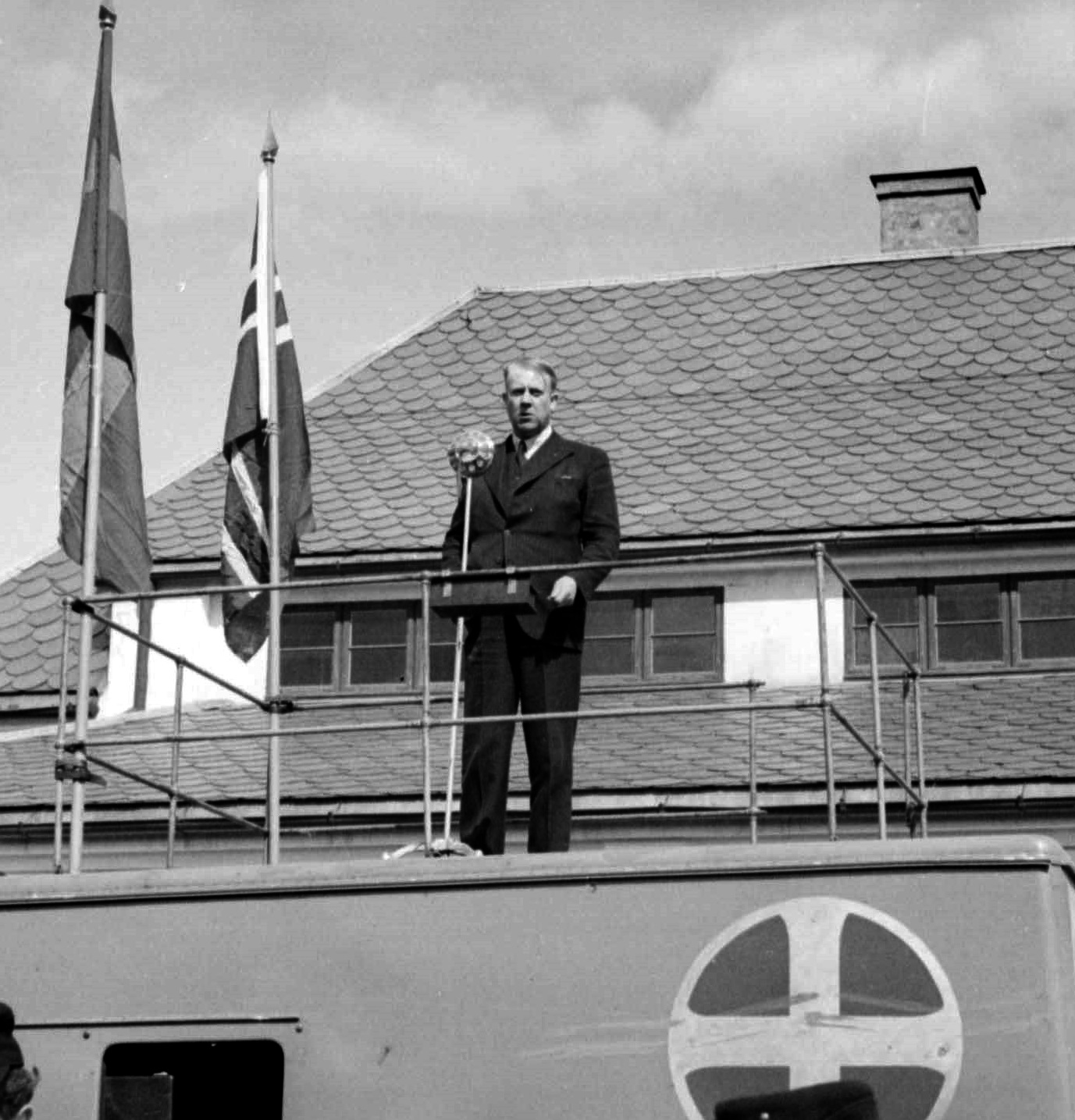 Vidkun Quisling holder tale i forbindelse med Setesdalsturen. Bilde nr: RA/PA-1456/Uc/0003/42/16 1064